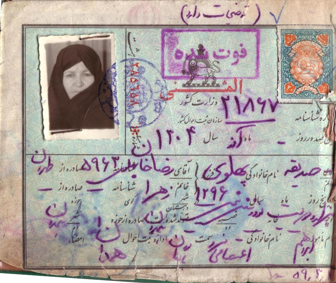 صفحه نخست شناسنامه صدیقه پهلوی فرزند رضاخان